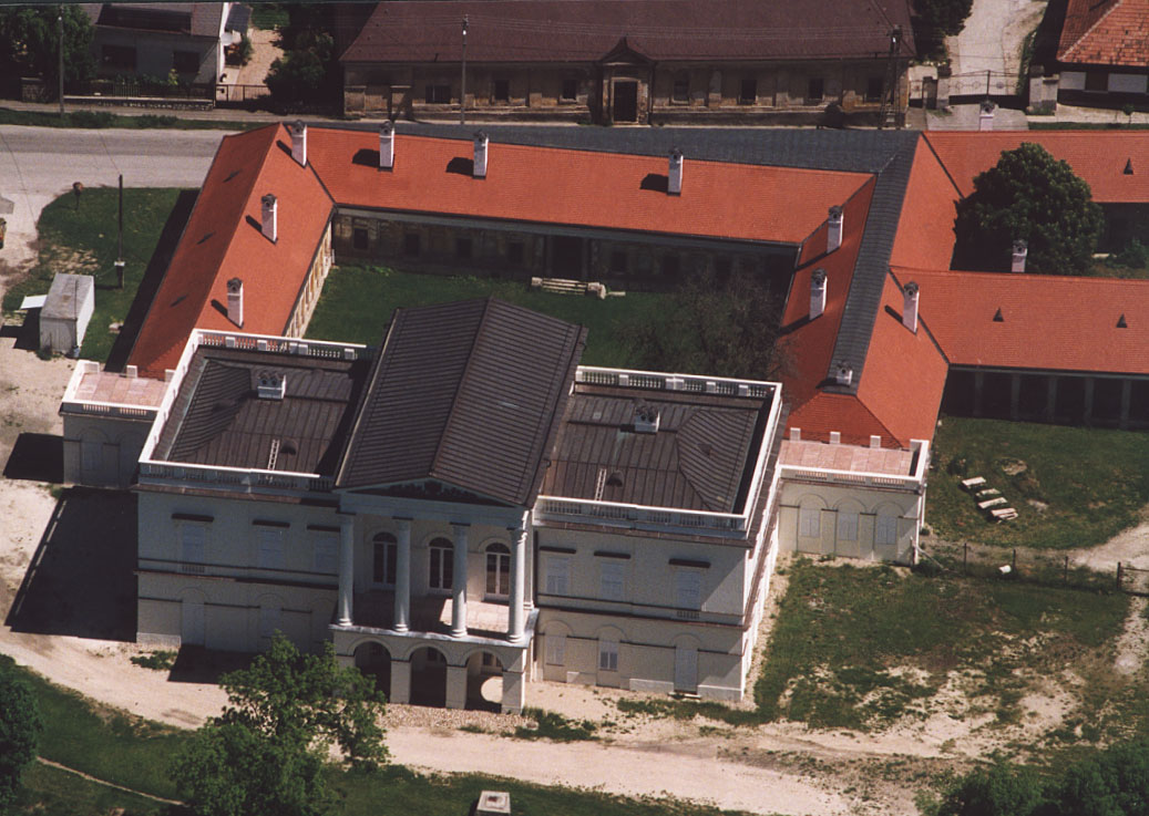 Palace - Bajna - Hungary - Europe